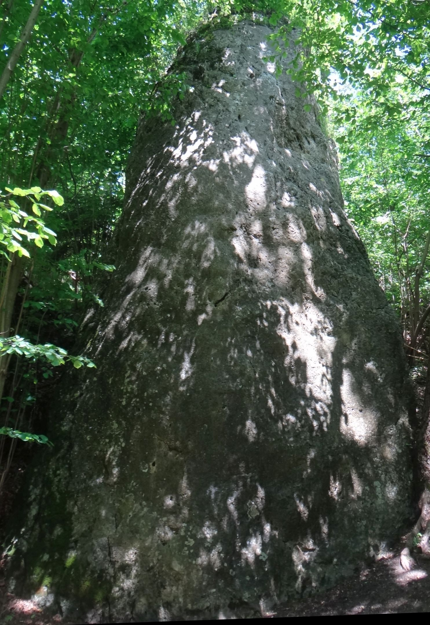 Menhir w grupie Węzich Skał w Dolinie Brzoskwini